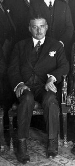 Henri Louis Baels, également appelé Harry of Hendrik, est né à Ostende, le 18 janvier 1878, et est décédé à Lima (Ohio), le 18 juin 1951, il était armateur et fut également membre du parti catholique de Belgique. Docteur en droit, il sera échevin, député à la chambre, Gouverneur et Ministre.